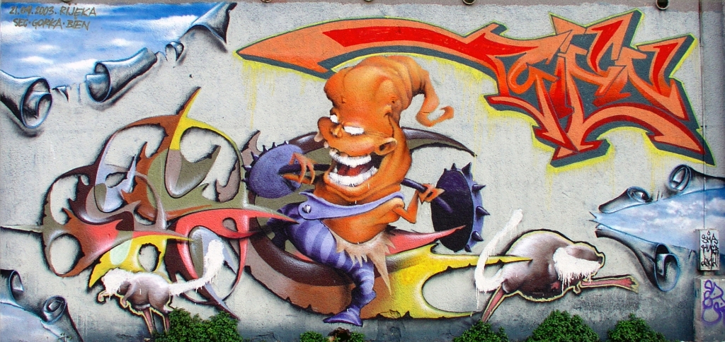 grafiti u Rijeci (Mrtvi kanal)